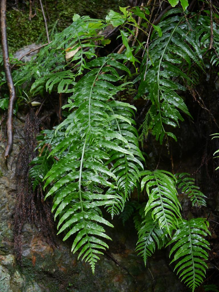 Asplenium wrightii：クルマシダ 2015/07/18 和歌山県田辺市：Tanabe City. Wakayama Pref. Japan